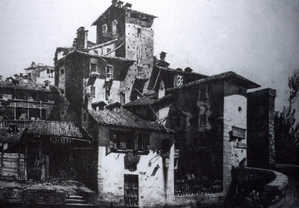 Milano, Porta Ticinese prima del "restauro" neogotico del 1865. A parte la torre al centro, tutti gli altri edifici sono stati demoliti. Confrontare link